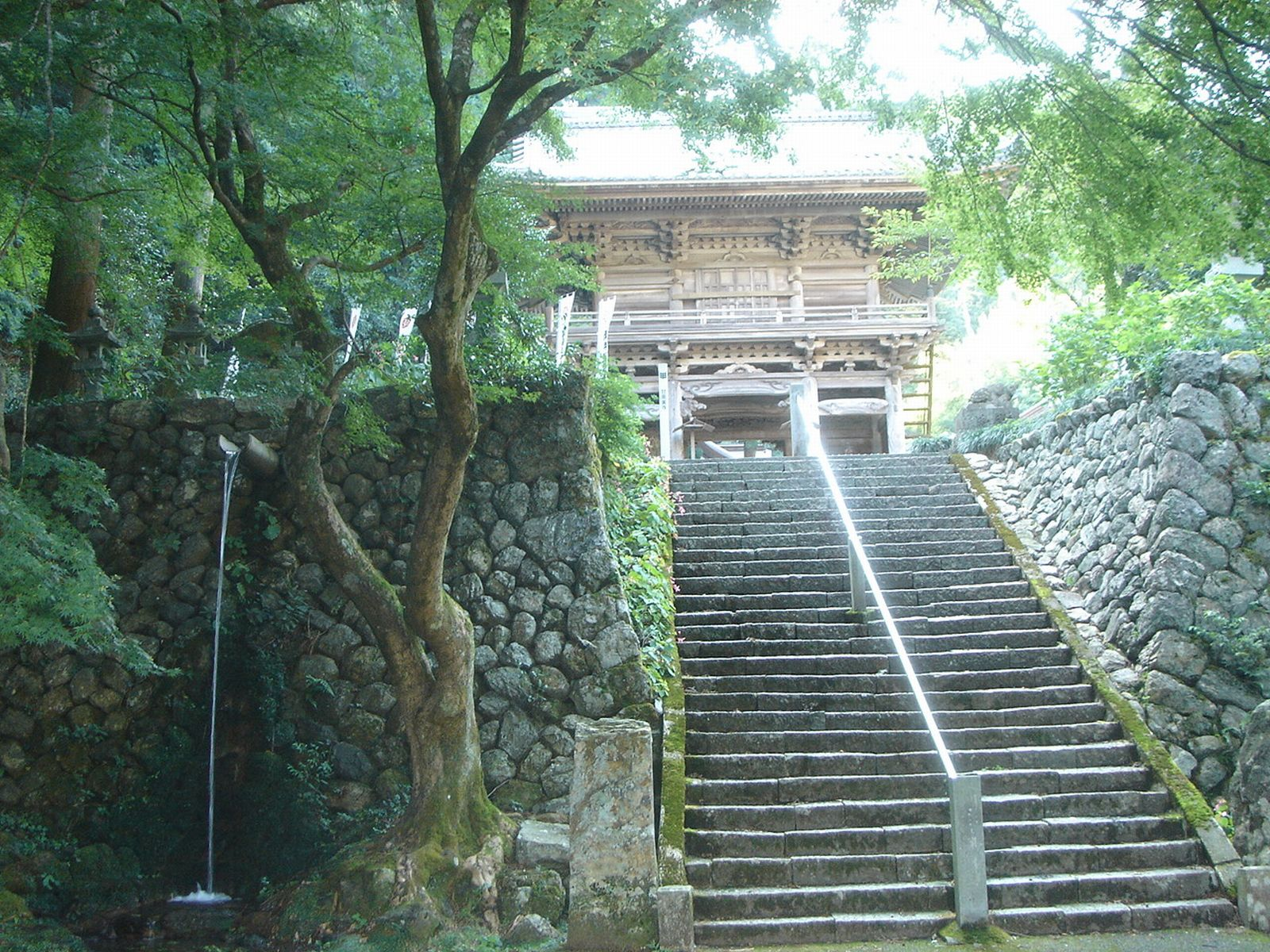 Kannamiji(Temple)(甘南美寺),Yamagata,Gifu,Japan(岐阜県山県市)で撮影。